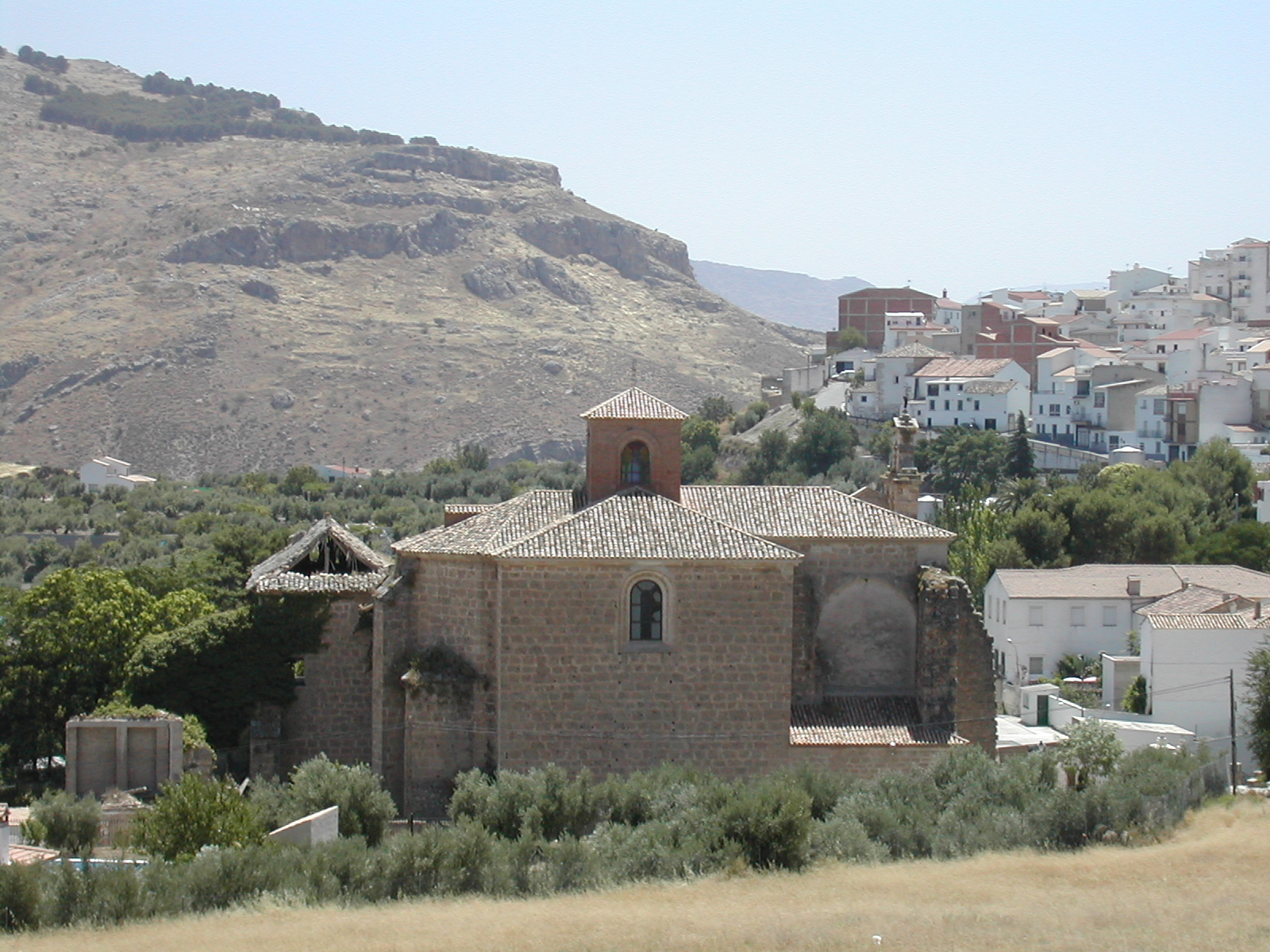 Visión general desde el noroeste del Antiguo Convento de Santo Domingo de La Guardia de Jaén.